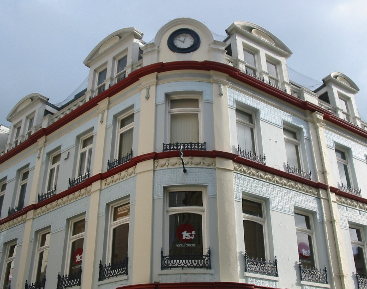 Nrf: Saint Hélyi, Jèrri